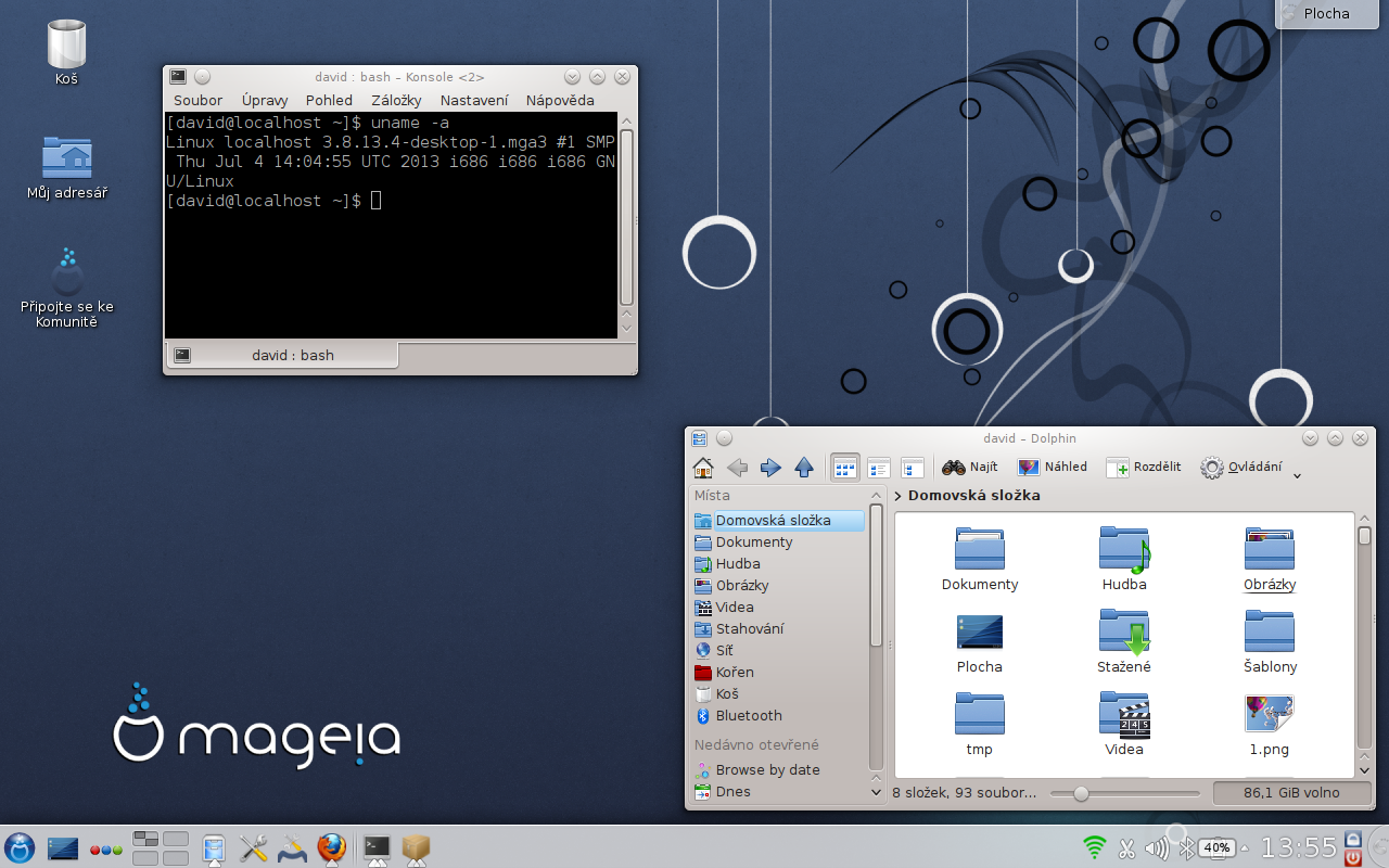 Linuxová distribuce Mageia 3 s prostředím KDE 4